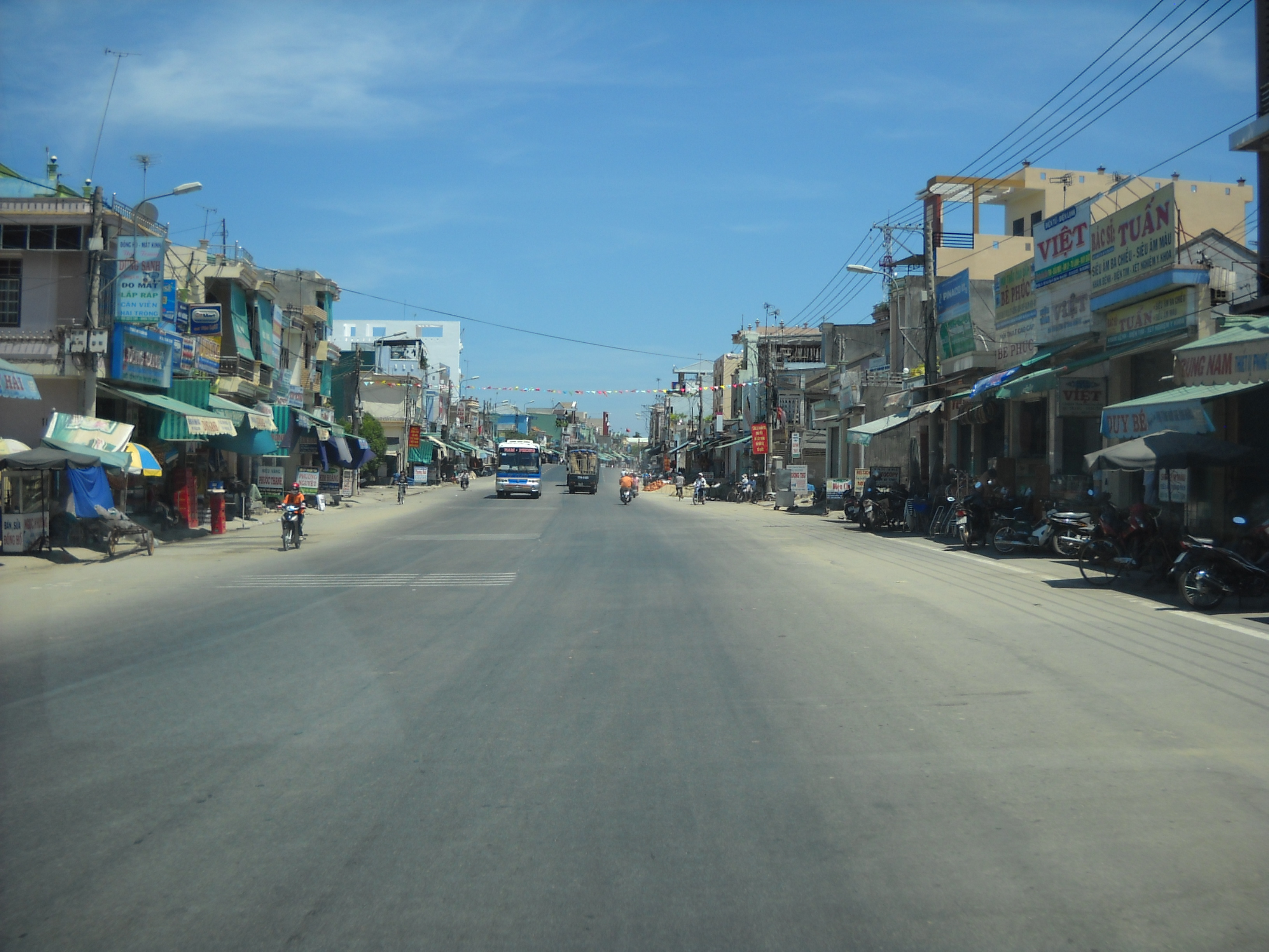 Chau O Town